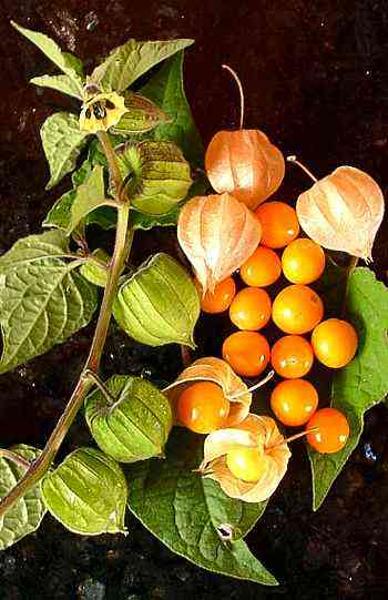 Uchuva